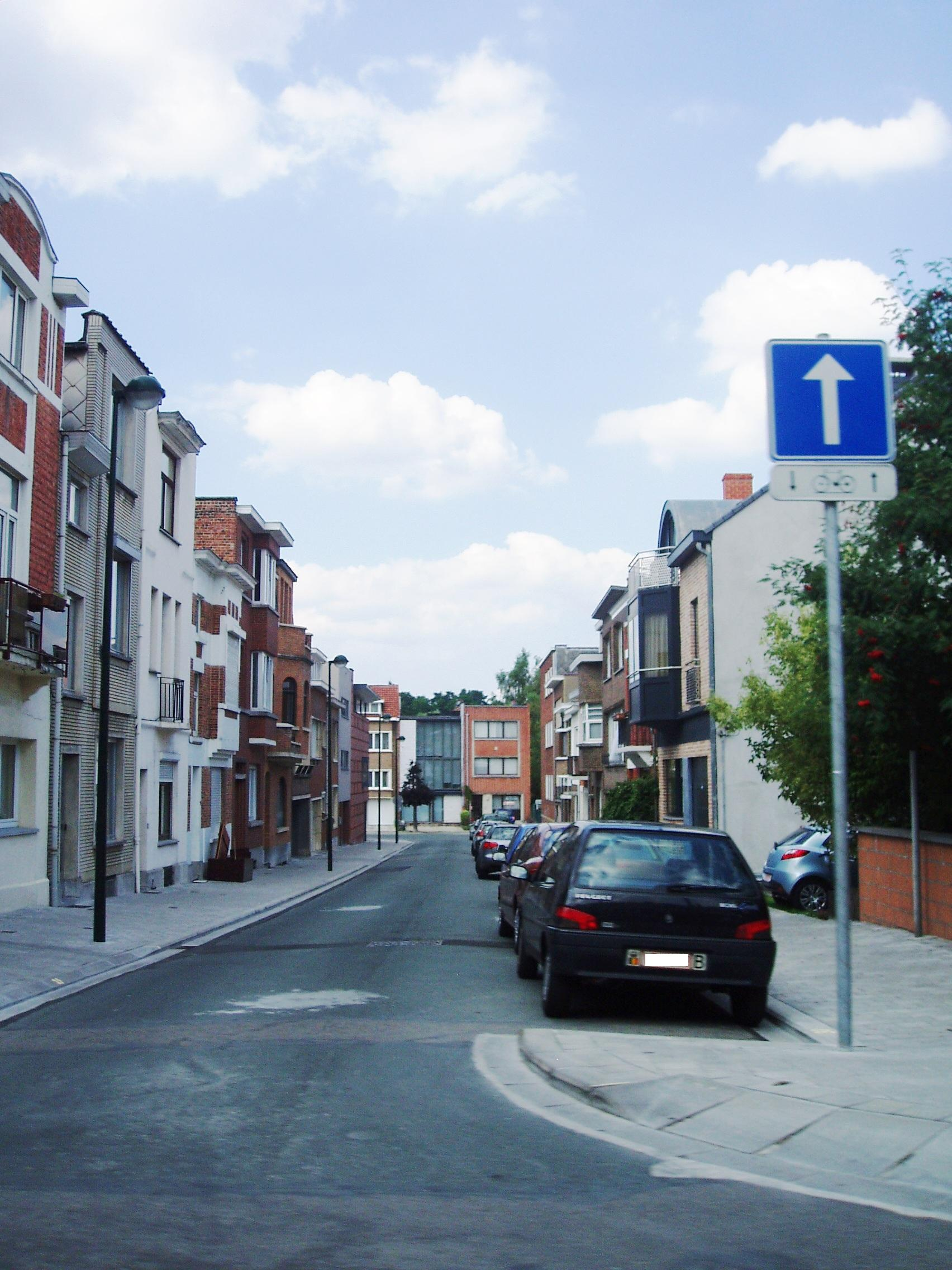 avenue Charles Dierickx Auderghem Belgium